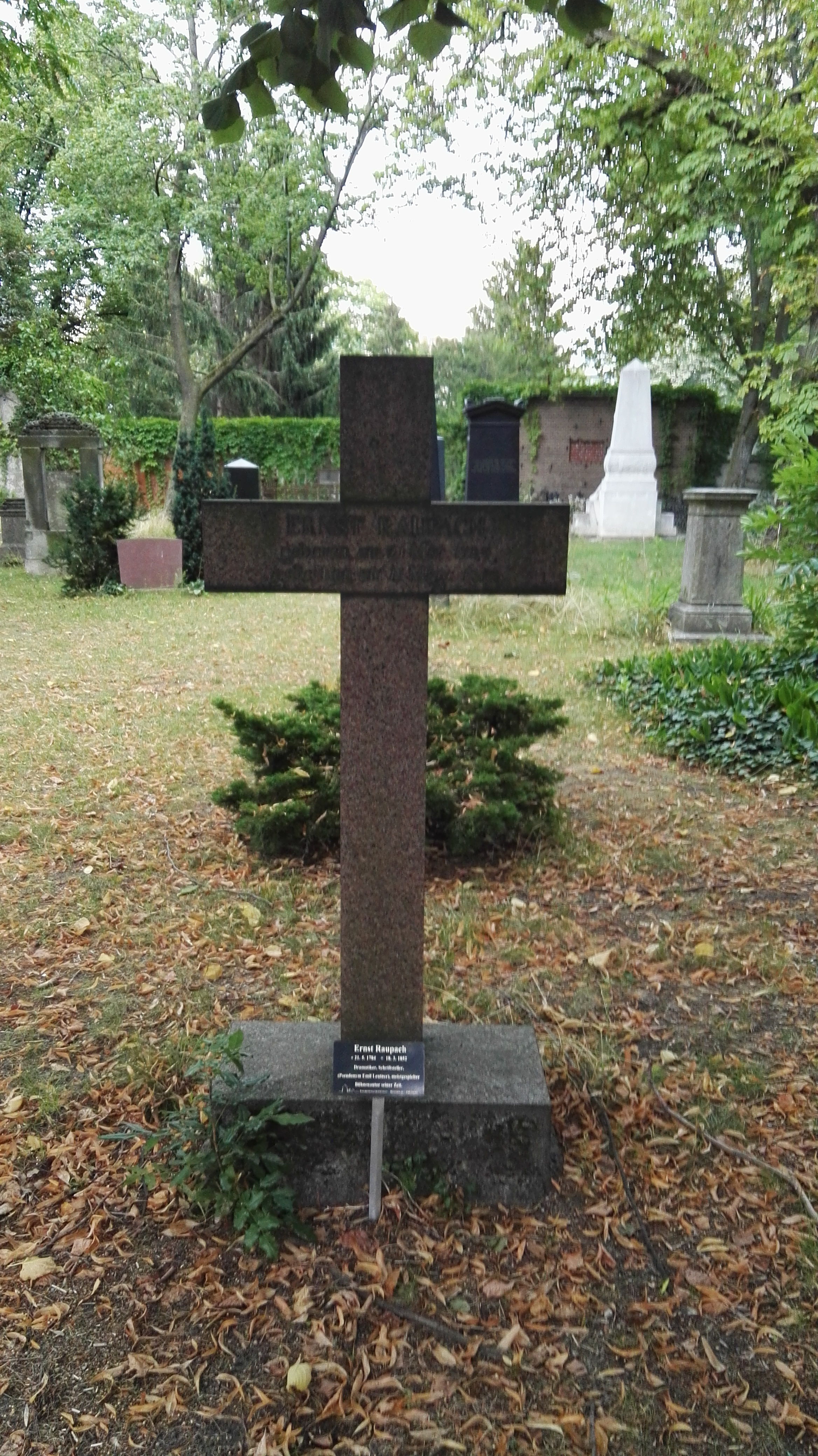 Grab von Ernst Raupach auf dem Friedhof I der Dreifaltigkeitsgemeinde in Berlin